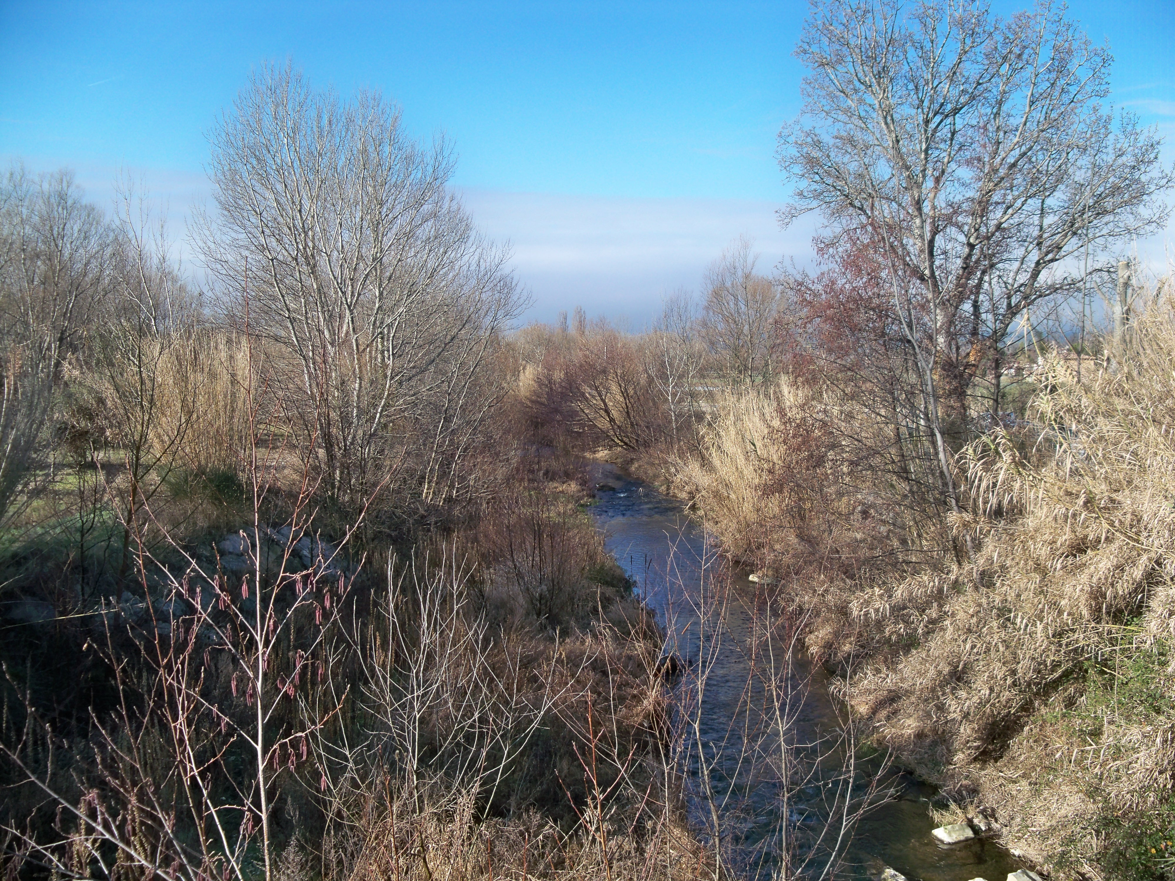 La Coronne, rivière du Vaucluse et de la Drôme, au niveau de Richerenches (Vaucluse, France)